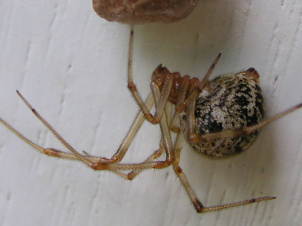 Un spécimen d'Achaearanea.